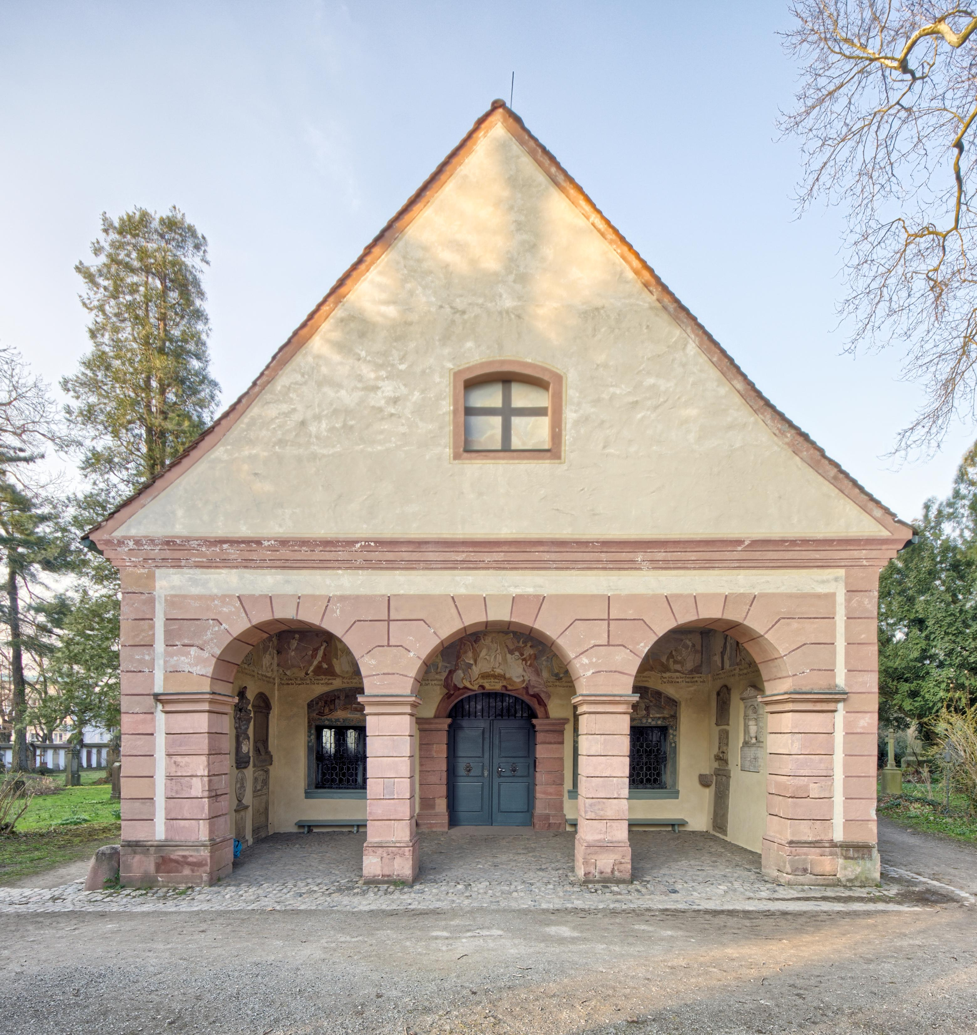 Der Totentanz in der Michaelskapelle auf dem Alten Friedhof in Freiburg im Breisgau nach der Restaurierung 2012 Hier die Kapelle und der Vorraum